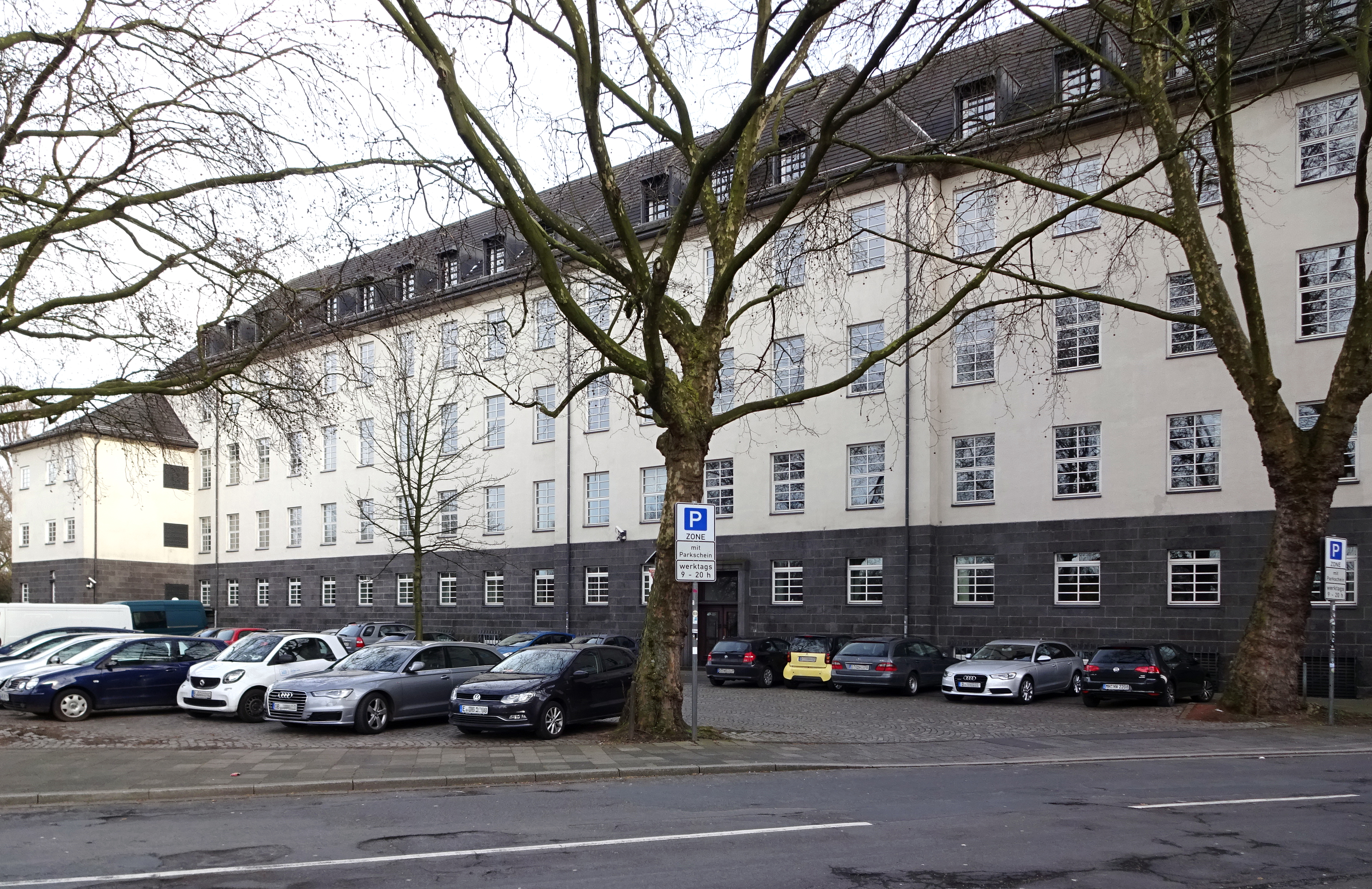 Phönix-Haus (Staatsanwaltschaft Düsseldorf) Gebäudeteil am Parkplatz Fritz-Roeber Straße, Düsseldorf-Altstadt